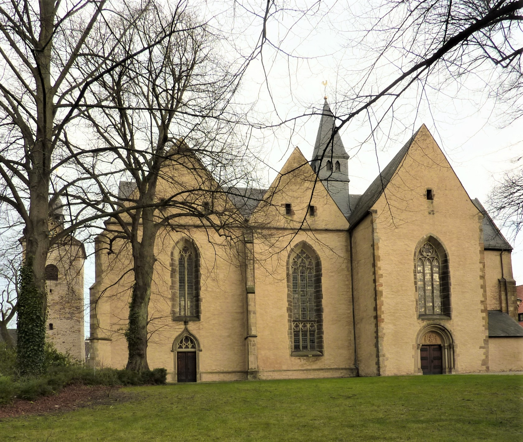 Stiftskirche Enger